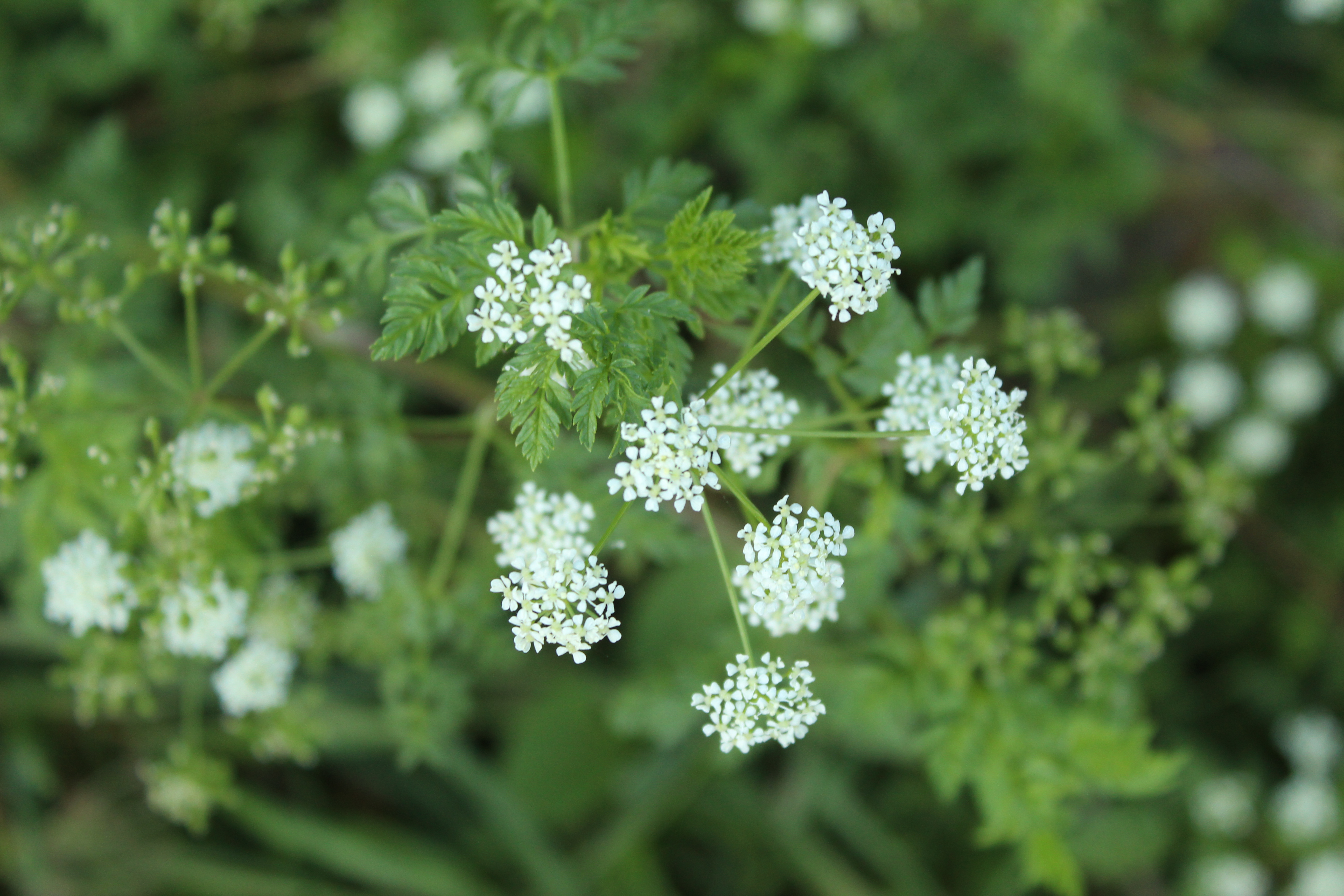 Cicuta (Conium maculatum) floreciendo en una zona rural de Duitama.